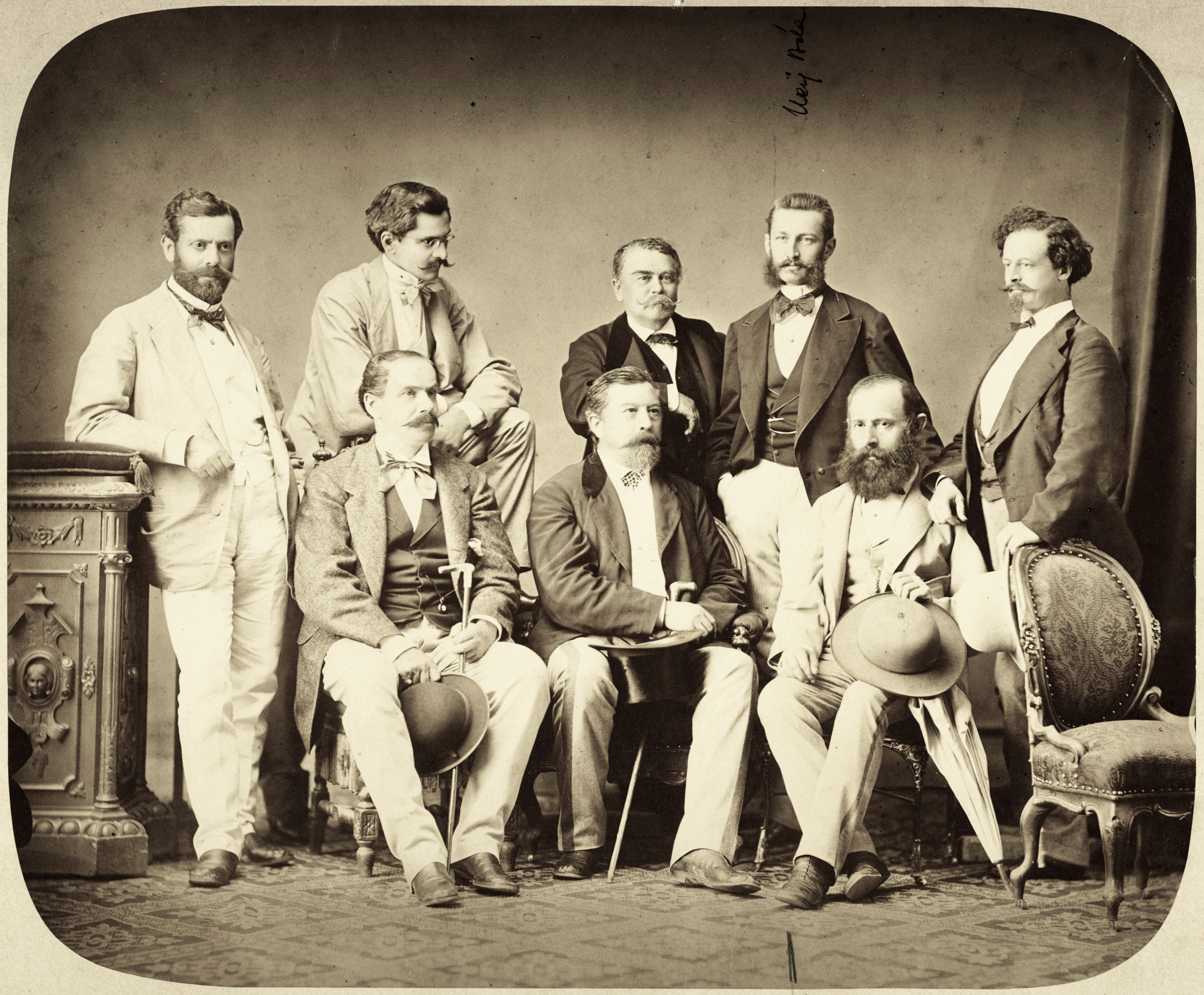 állnak balról: Wechselmann Ignác, Unger Emil, Faváry János, Neÿ Béla, Koch Henrik ülnek: Anton Baumgarten, Ybl Miklós, Wéber Antal építészek. A felvétel 1880 körül készült. Location: Hungary Tags: studio, architecture, celebrity, bowler hat, top hat Title: állnak balról: Wechselmann Ignác, Unger Emil, Faváry János, Neÿ Béla, Koch Henrik ülnek: Anton Baumgarten, Ybl Miklós, Wéber Antal építészek. A felvétel 1880 körül készült.